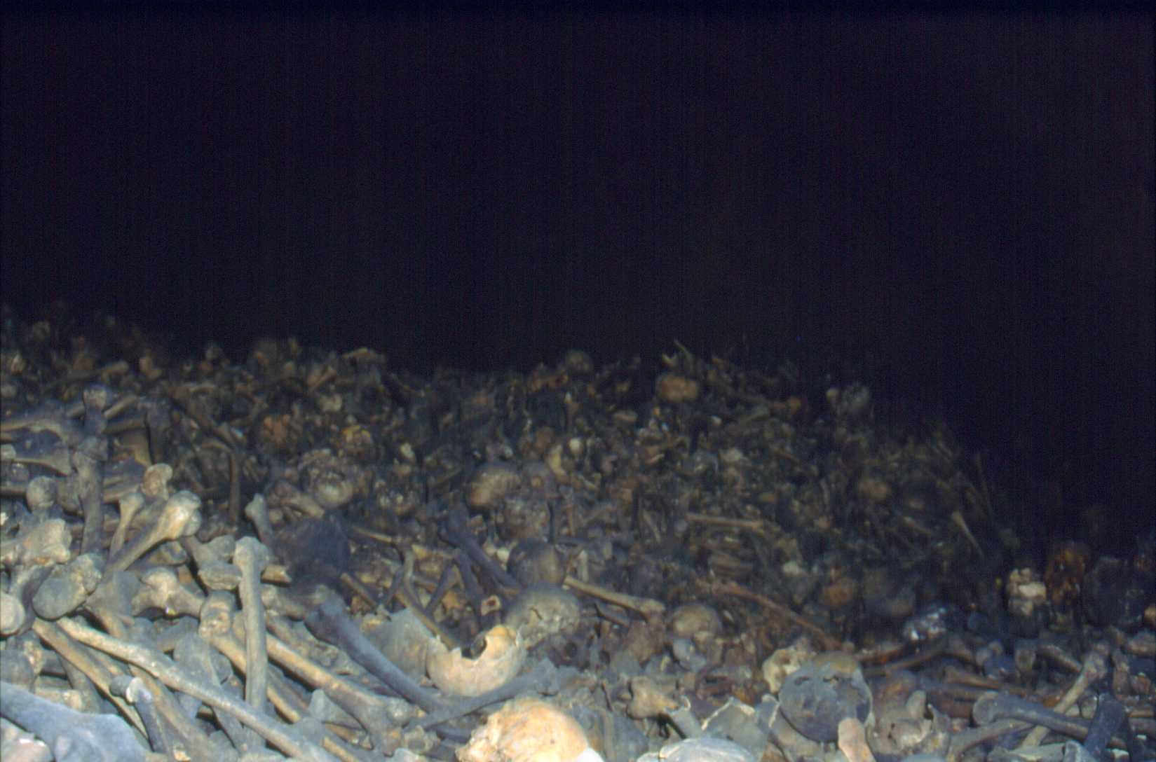 ein Haufen Knochen von Opfern der Pest im Untergrund von Wien